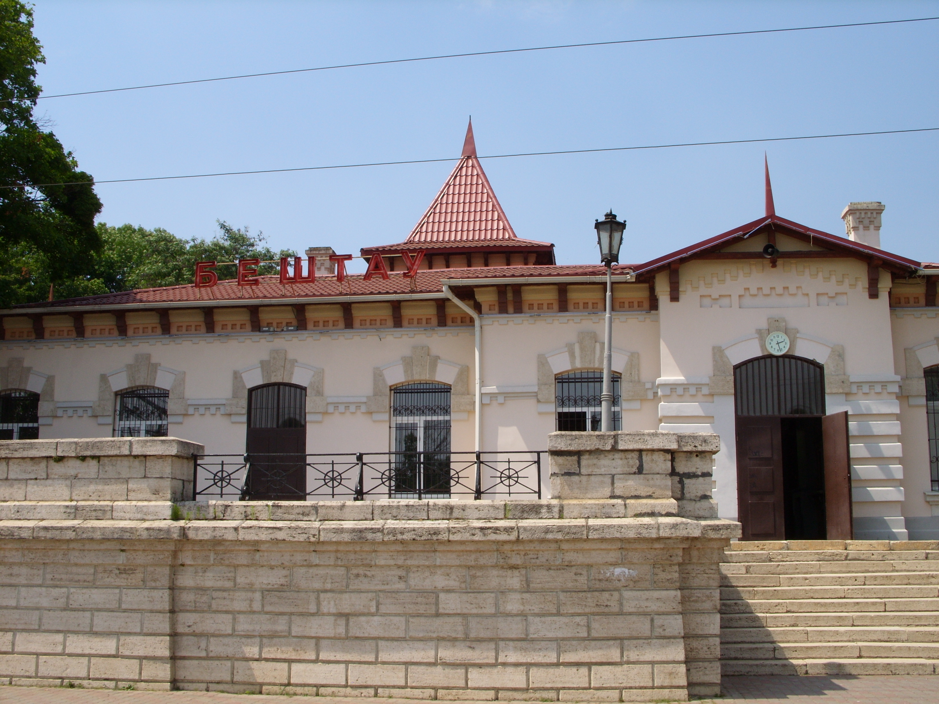 снимок июля 2009 г.